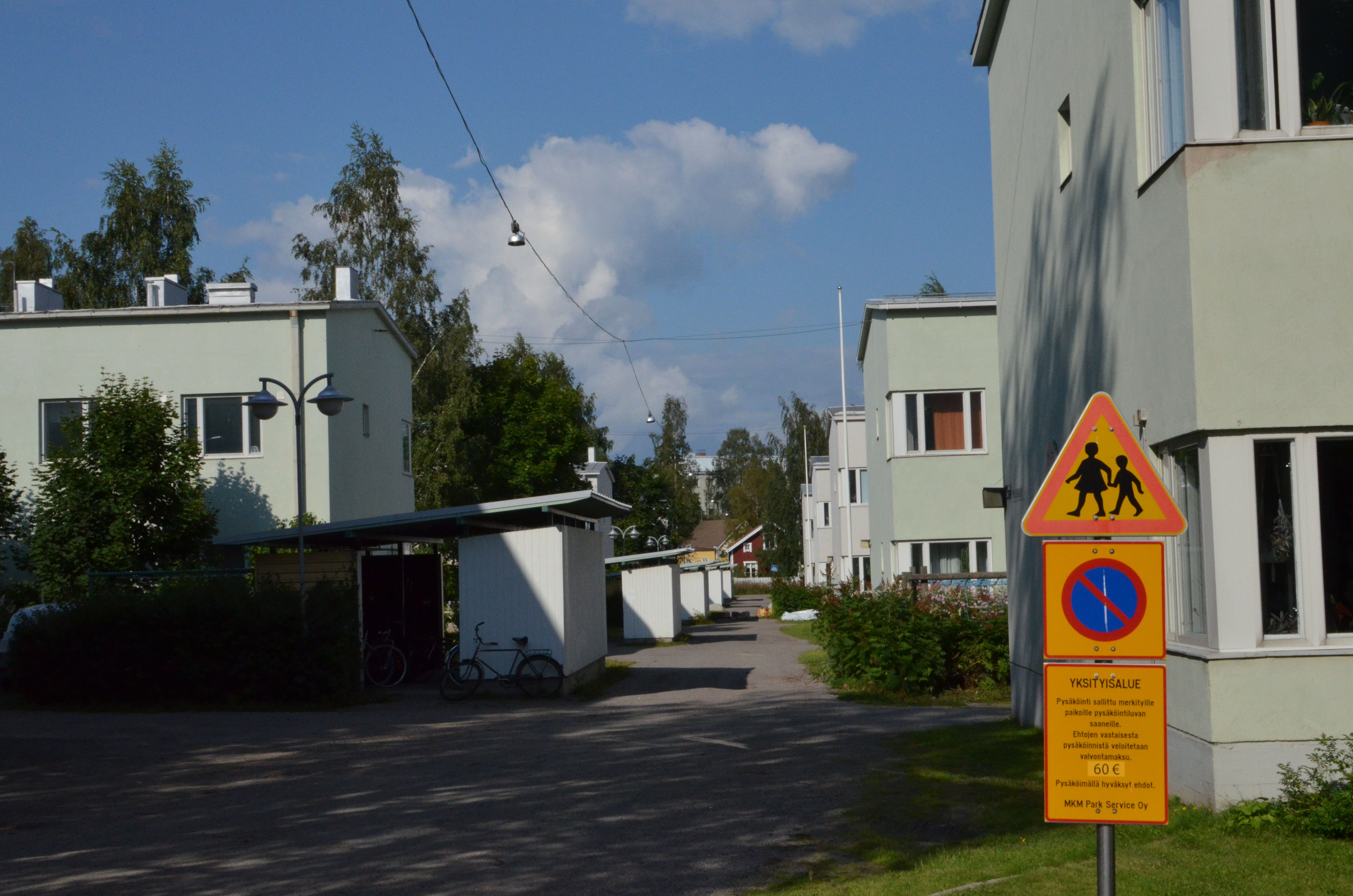 Apartment buildings in Rautpohja, Jyväskylä